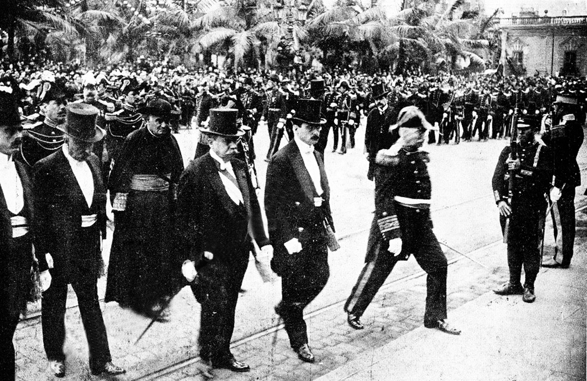 Guillermo Billingurst durante entierro de Ex presidente Nicolas pierola